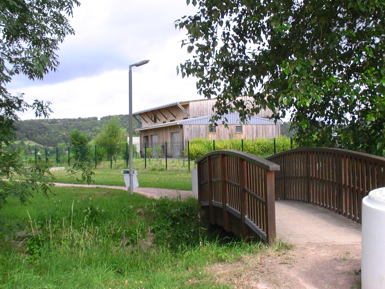 Passerelle sur le ru du Hazey au Val d'Hazey